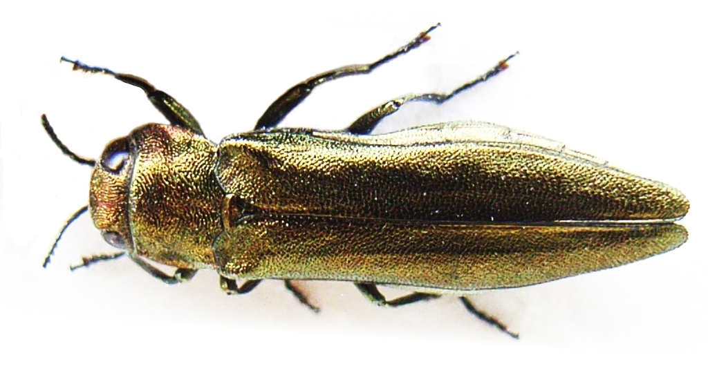 Agrilus viridis